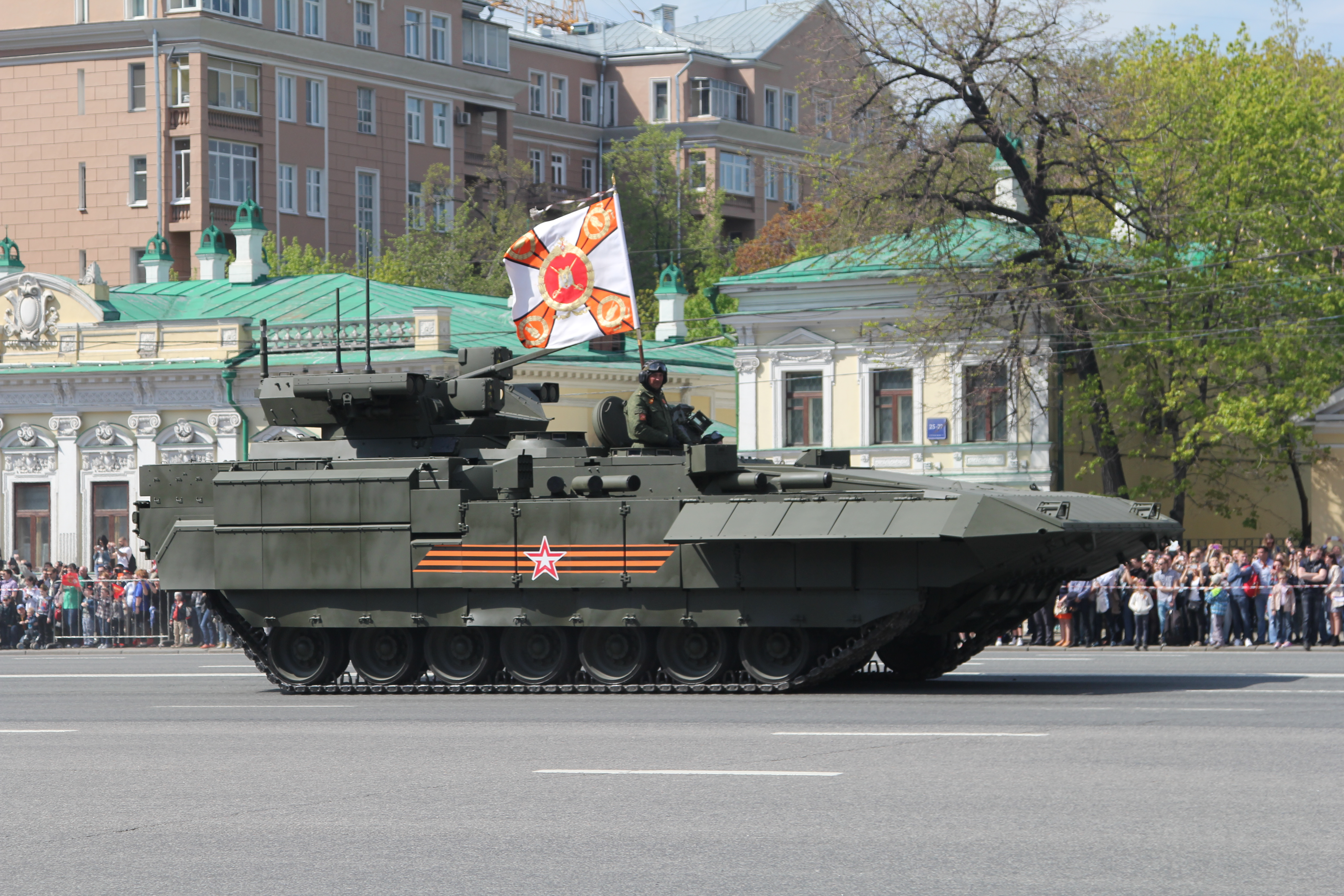 Т-15